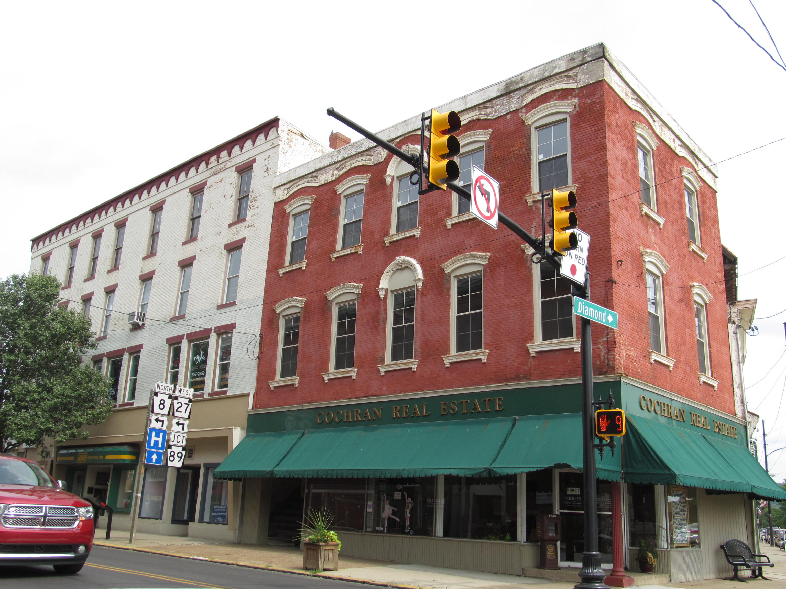 Titusville, Pennsylvania